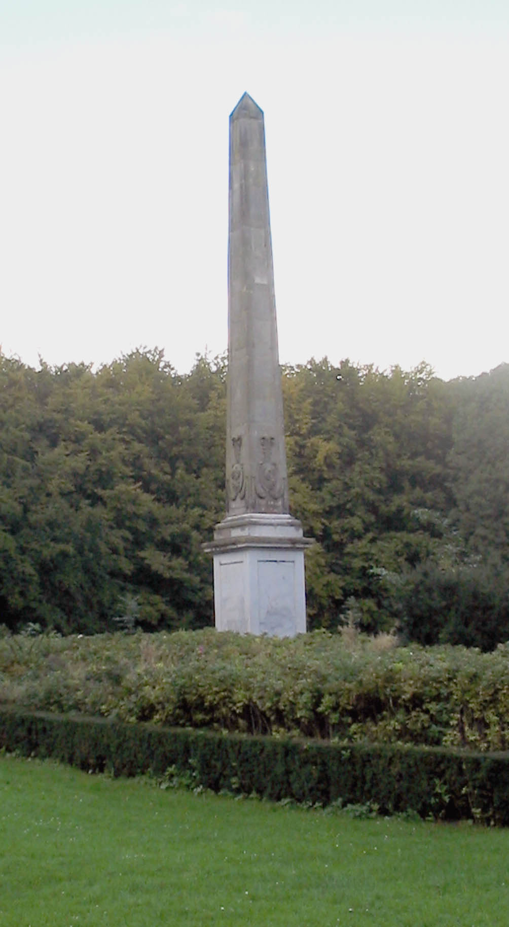 Naald van Rijswijk, Rijswijk, 2 oktober 2005 (Vrede van Rijswijk))